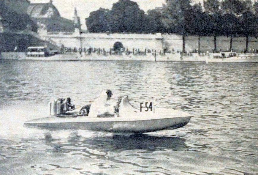 Jean Dupuy, vainqueur du Meeting international de France du Yacht Moteur Club de France, en juillet 1934 à Paris sur 'Soriano-Pedroso'.